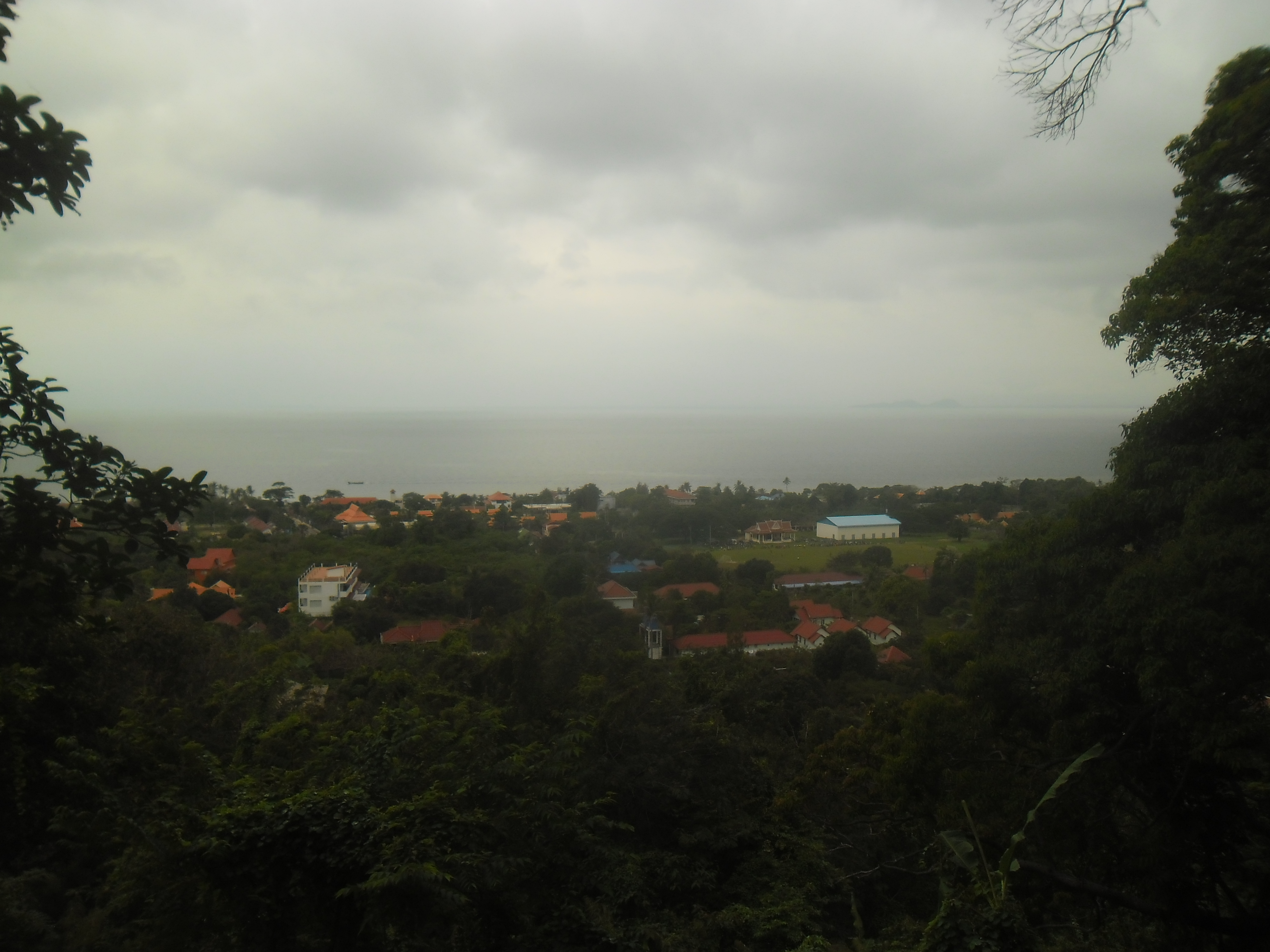 Kep, Kambodža